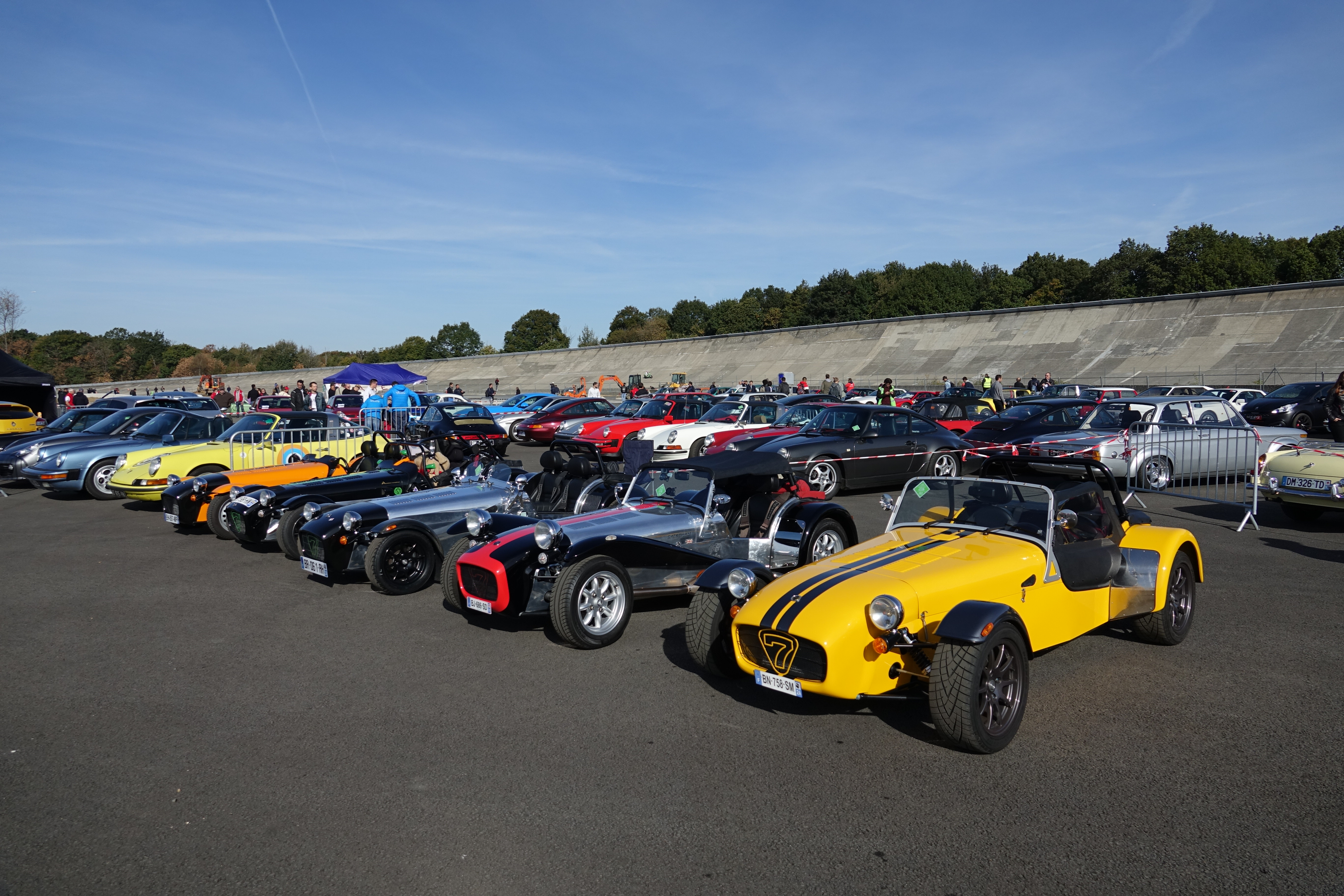 Club Caterham aux Grandes Heures Automobiles 2018